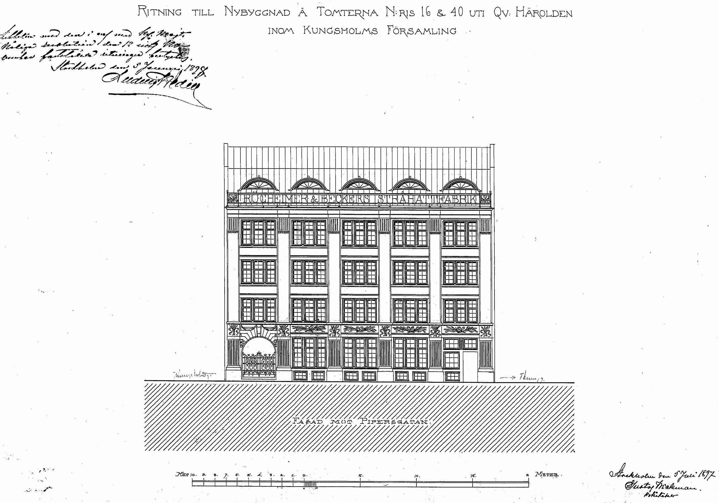 Pagen 14 fasad mot Pipersgatan